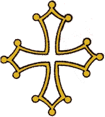 Bandiera dei Bosons